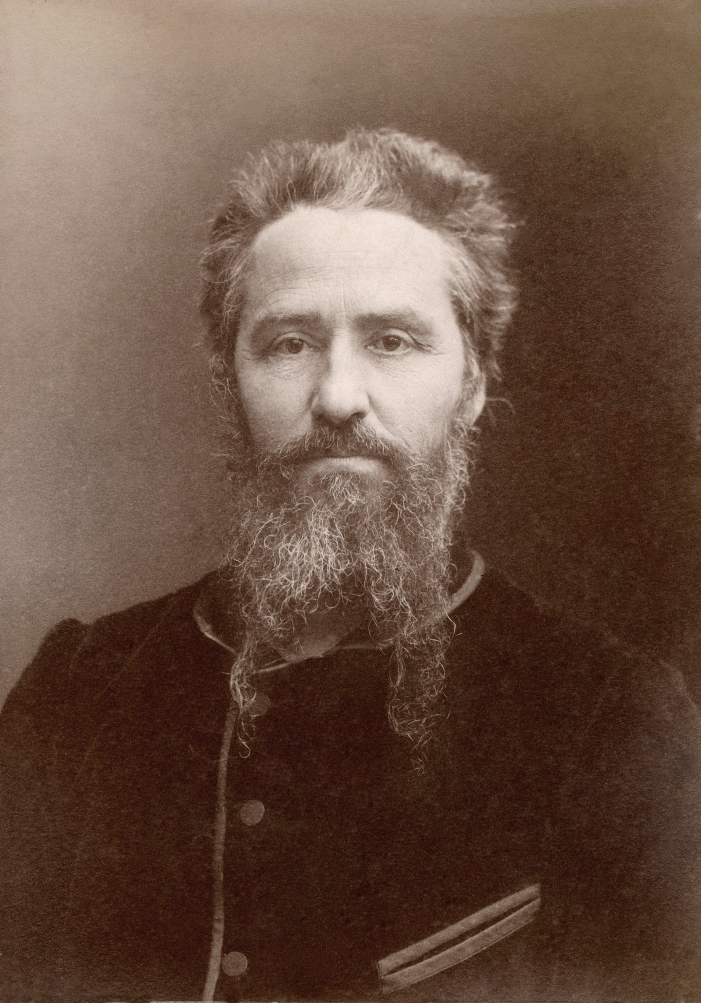 Onésime Reclus (1837 - 1916), géographe français.